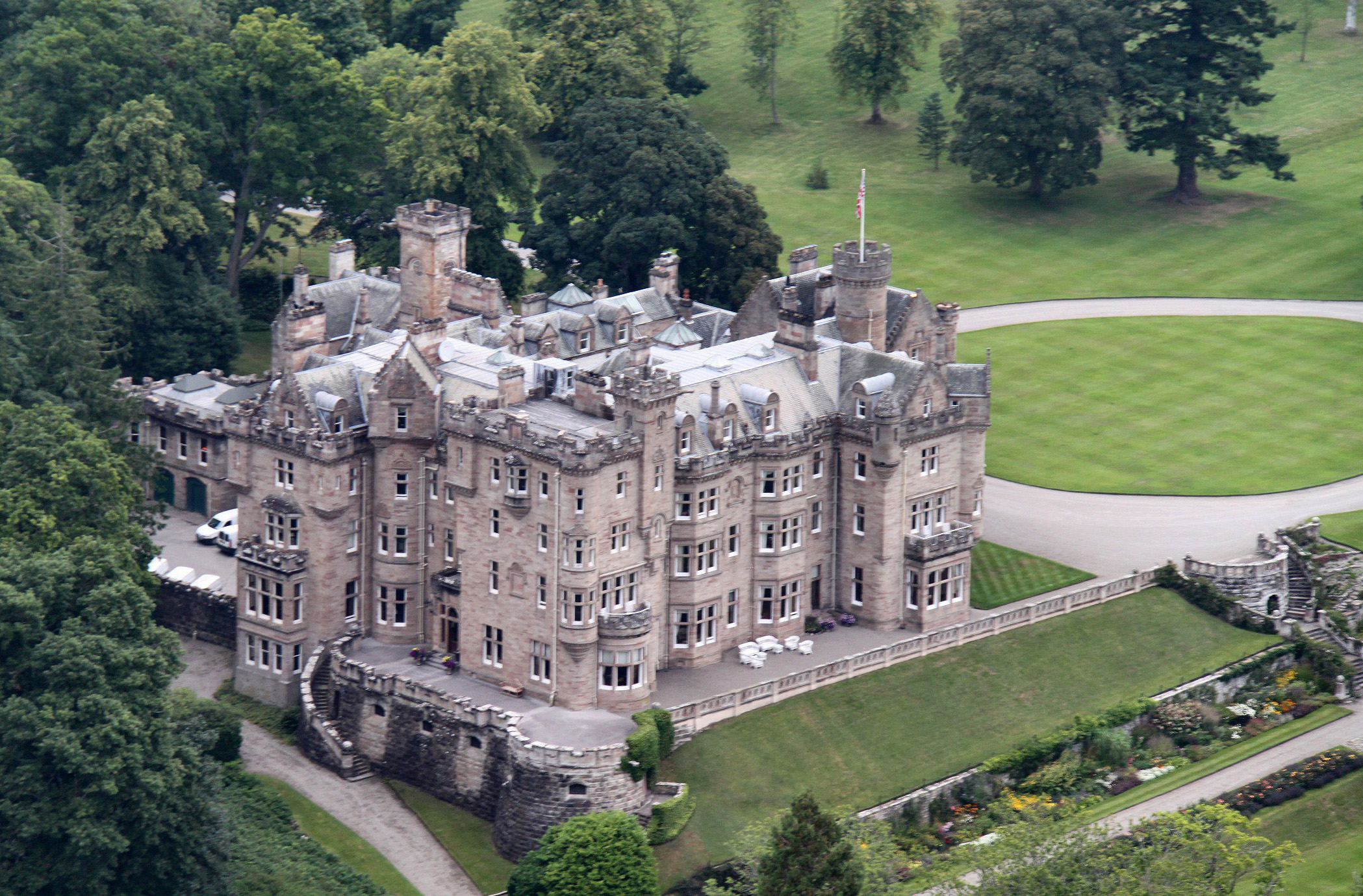 Luftbild von Skibo Castle, Sutherland, Highlands